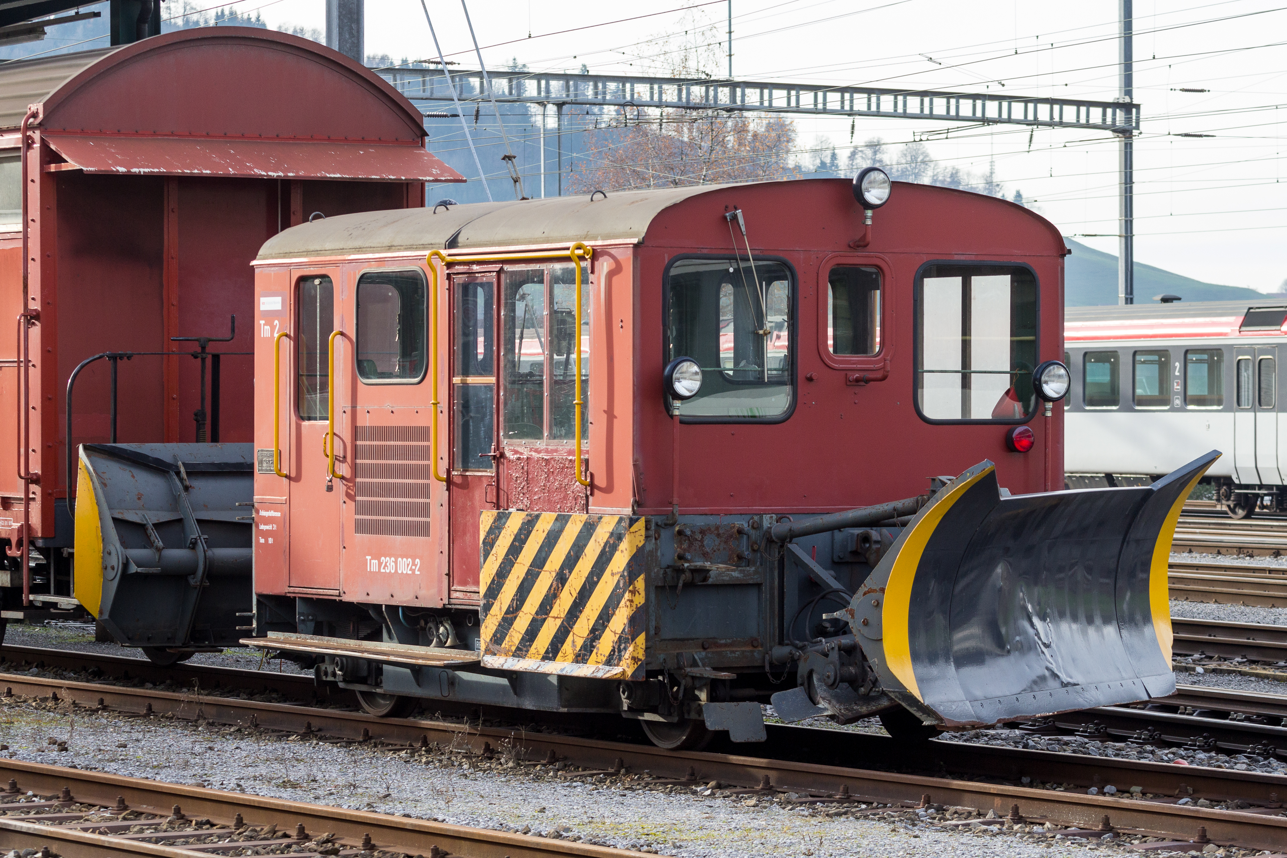 SOB Diesel-Kleinlokomotive/Rangiertraktor TM 236 002 mit Schneeräumschilden in Herisau AR